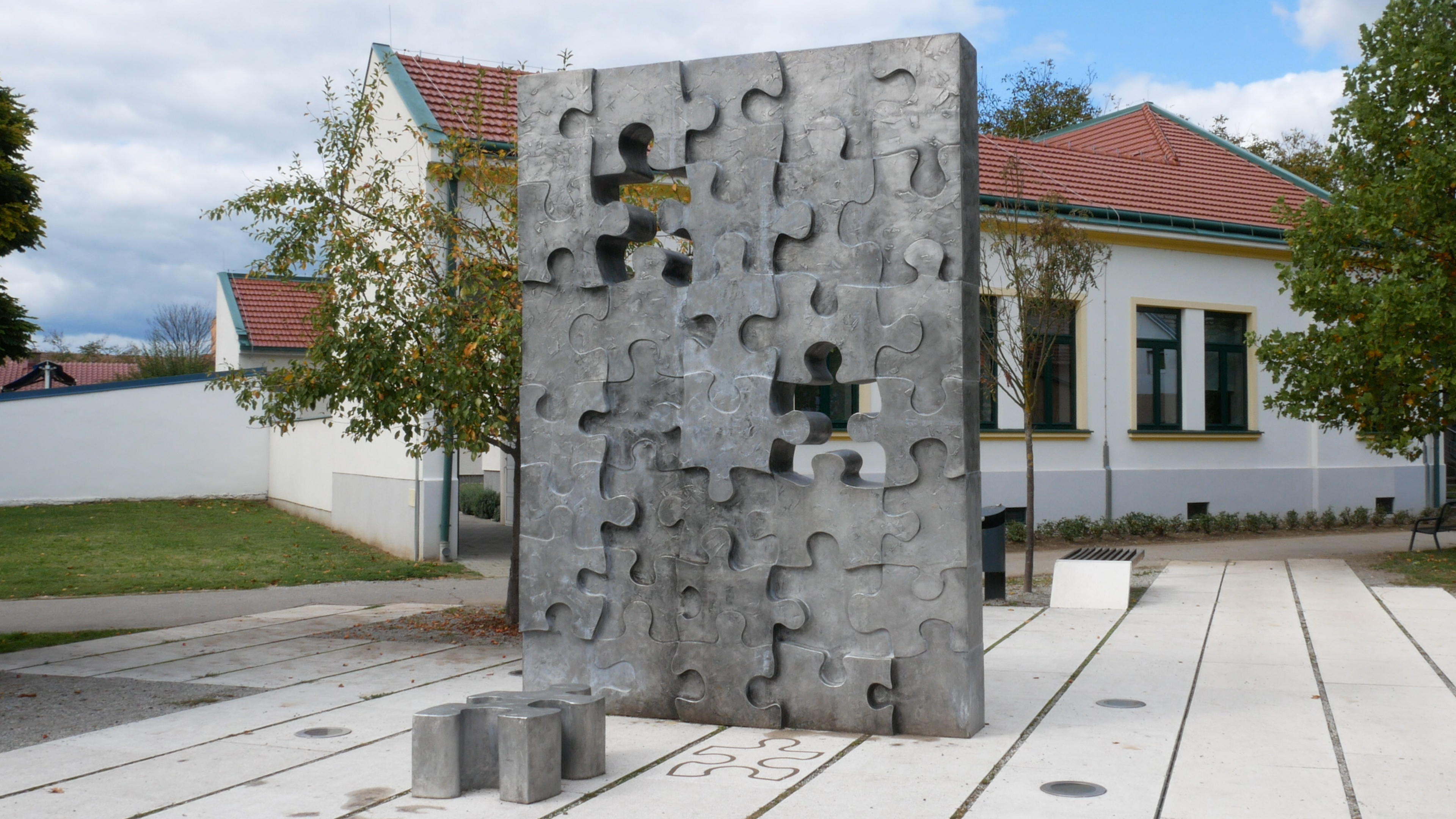 Spomenik poginuloj djeci u Slavonskom Brodu